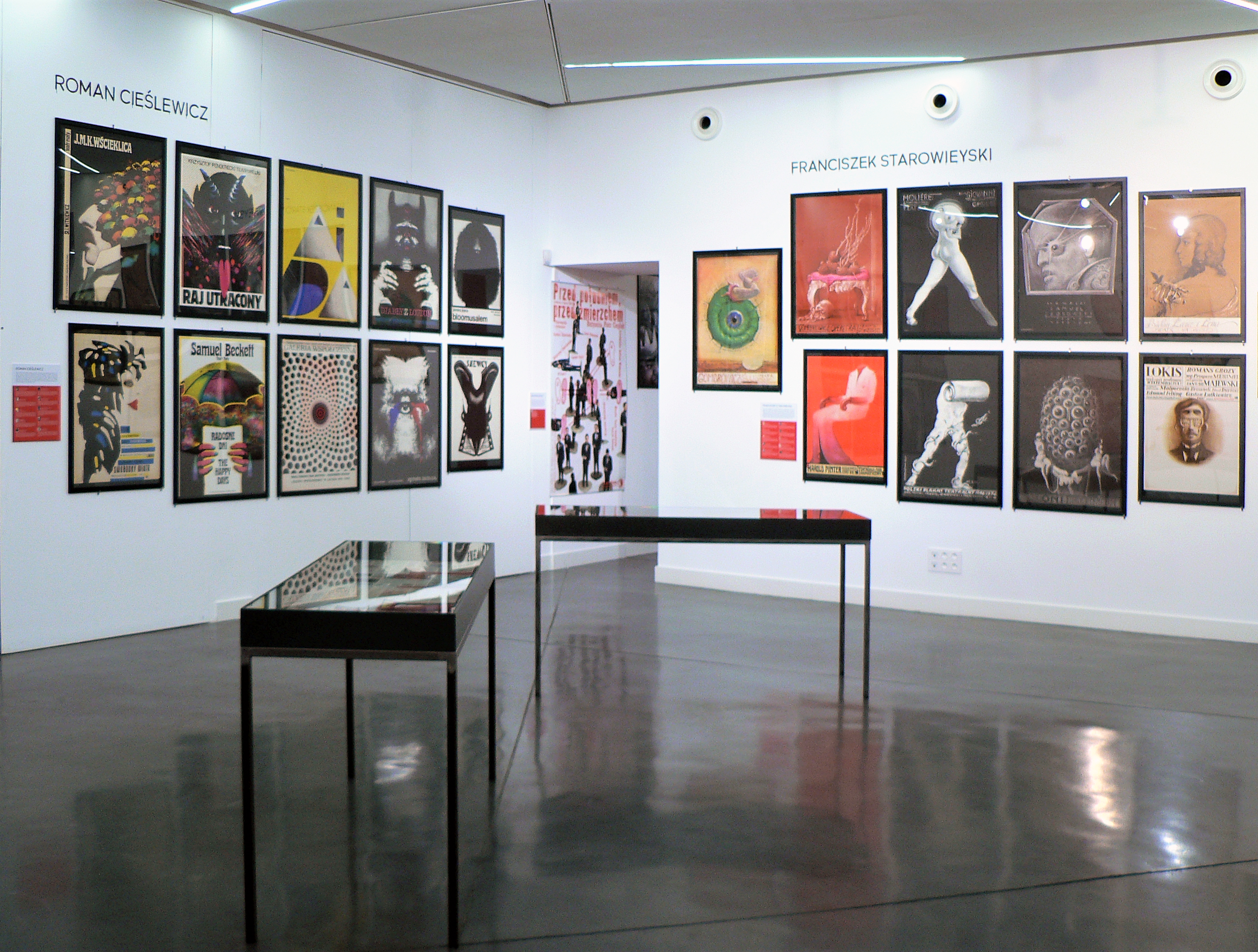 "L'affiche polonaise. 1952-2018. Une révolution graphique", exposition au Centre du graphisme d'Échirolles, du 17/11/2018 au 31/01/2019, dans le cadre du Mois du Graphisme dédié au thème "Pologne. Une révolution graphique". Échirolles, Isère, AuRA, France.